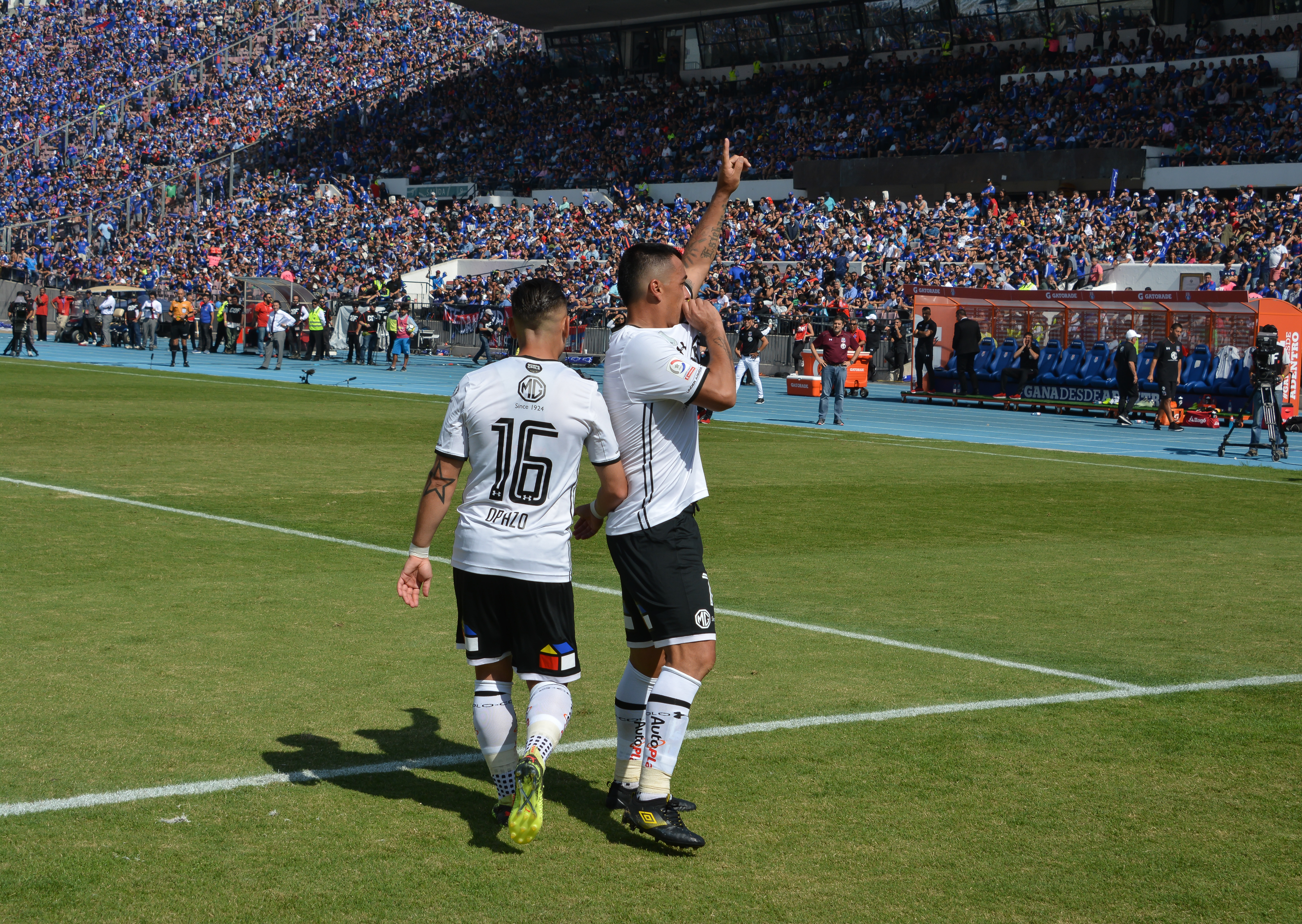 Universidad de Chile v Colo-Colo, Estadio Nacional, Santiago, Chile.